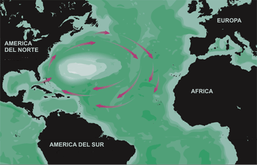 Mapa del mar de los Sargazos